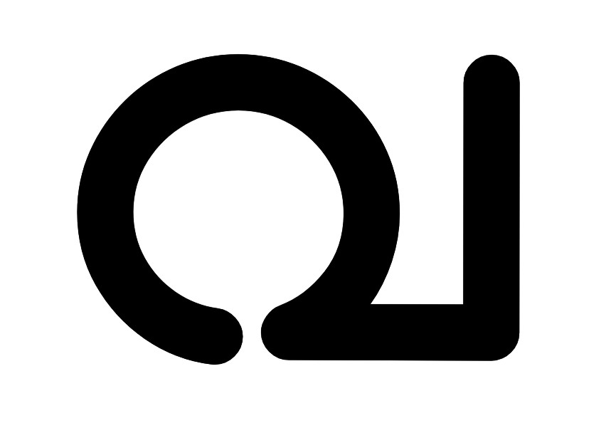 വ മലയാളം അക്ഷരം